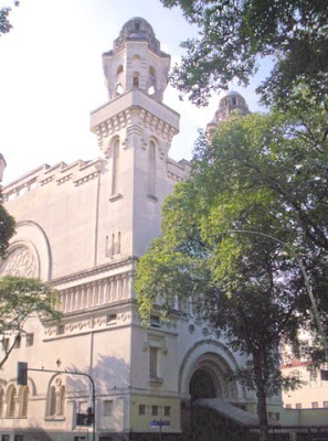 Vista del Tempio Israelita di Rio de Janeiro